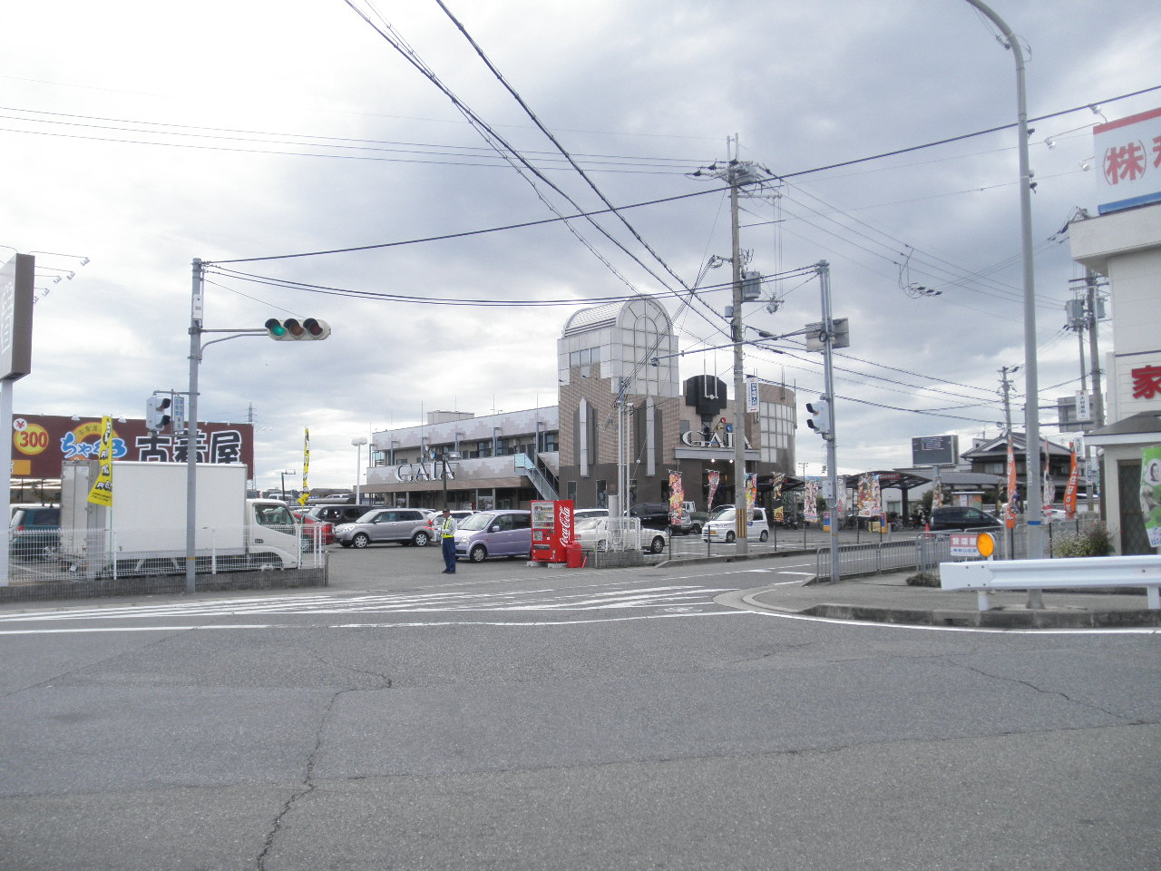 兵庫県三木市平田 兵庫県道360号正法寺三木停車場線